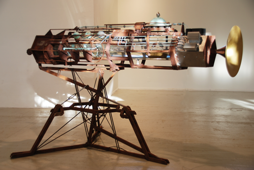 Phi Tubular, Akoestisch instrument dat rayleigh golven in water hoorbaar maakt.